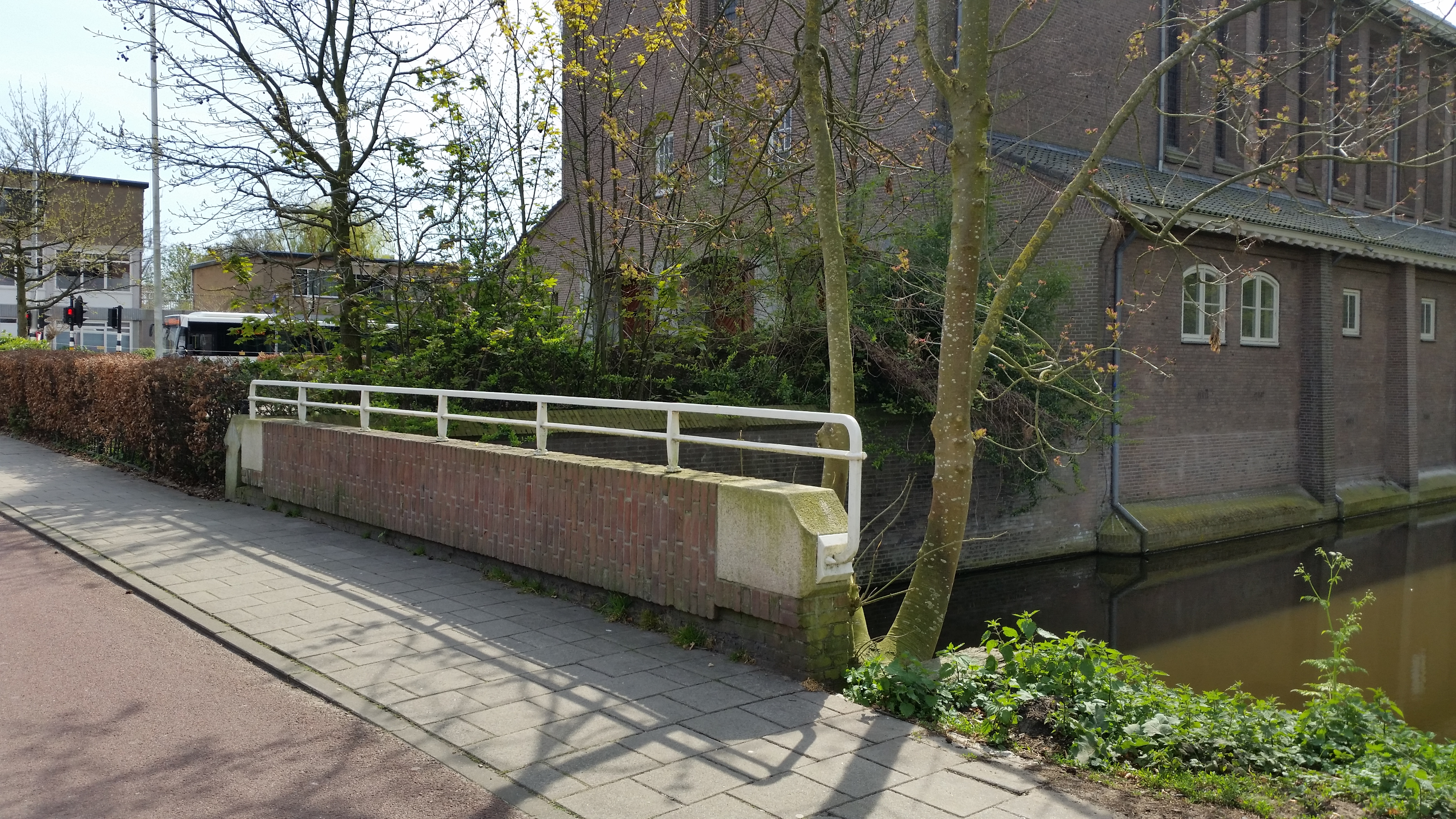 Impressie van de Frankendaelburg (brug 217) in de Middenweg, Amsterdam (april 2020)